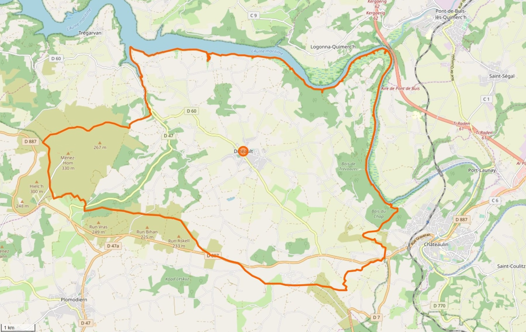 Cette carte a été créée à partir des données du projet Openstreeetmap. This map may be incomplete, and may contain errors. Don't rely solely on it for navigation.